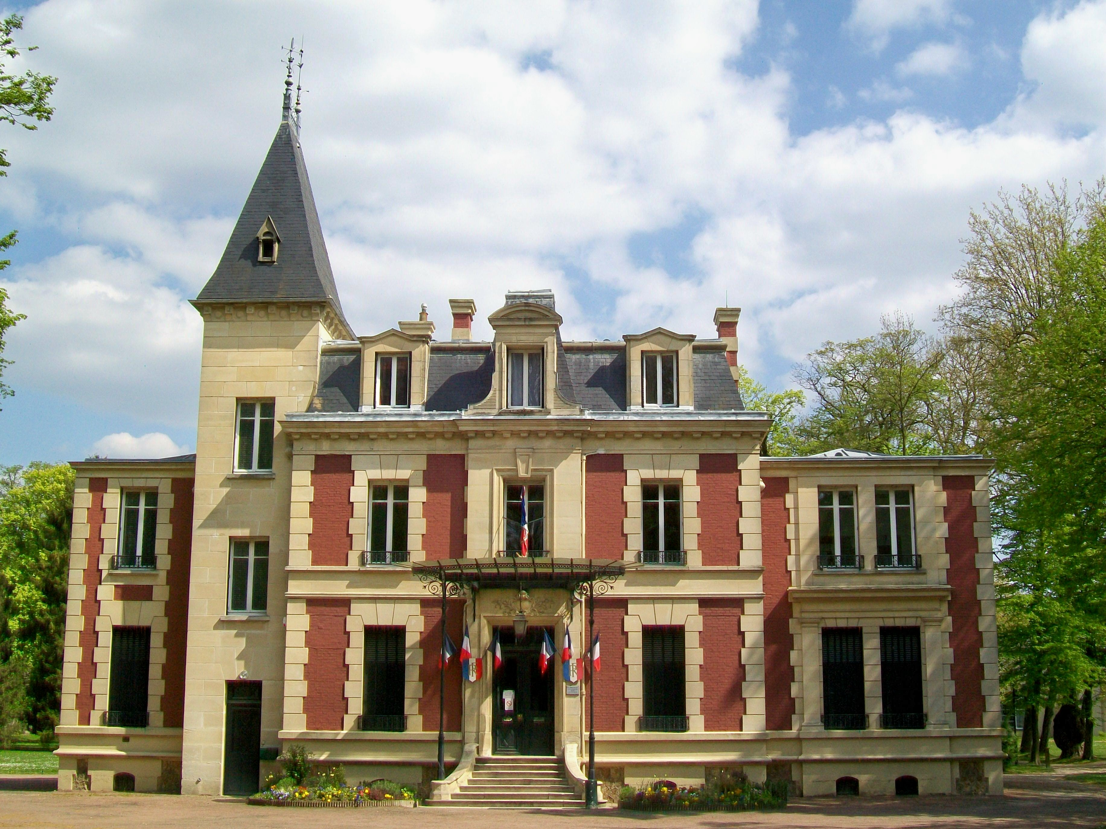 La mairie, ancienne demeure bourgeoise entouré d'un petit parc paysager, acquise par la ville en 1977 suite à l'augmentation du nombre d'habitants de la commune.